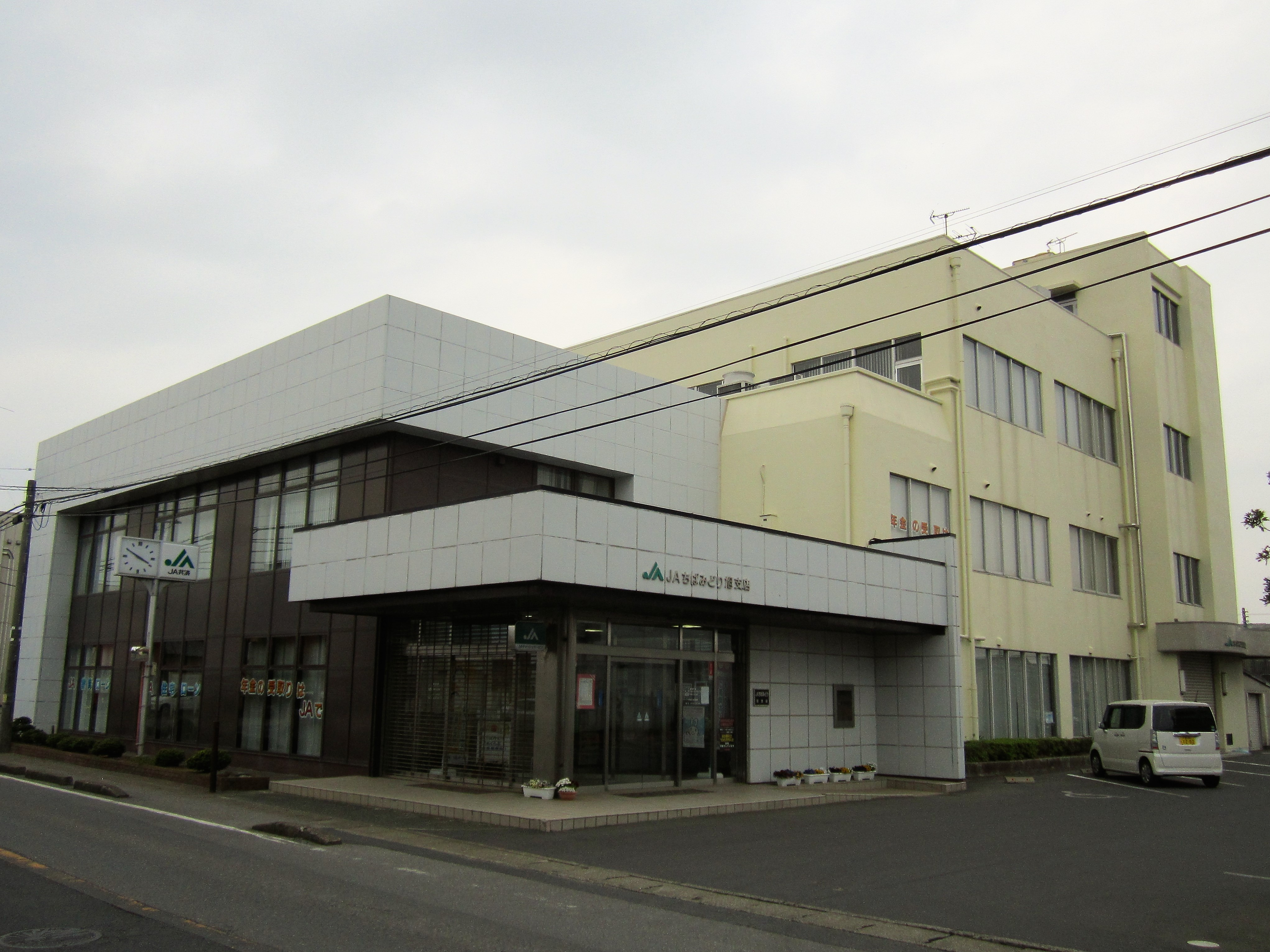 ちばみどり農業協同組合本店・旭支店（旭市ロ） Canon PowerShot A2200